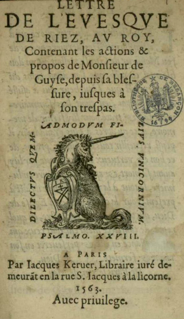 Title page of Carle's Lettres de l'evesque d Riez (Paris, M. de Vascosan, 1563).